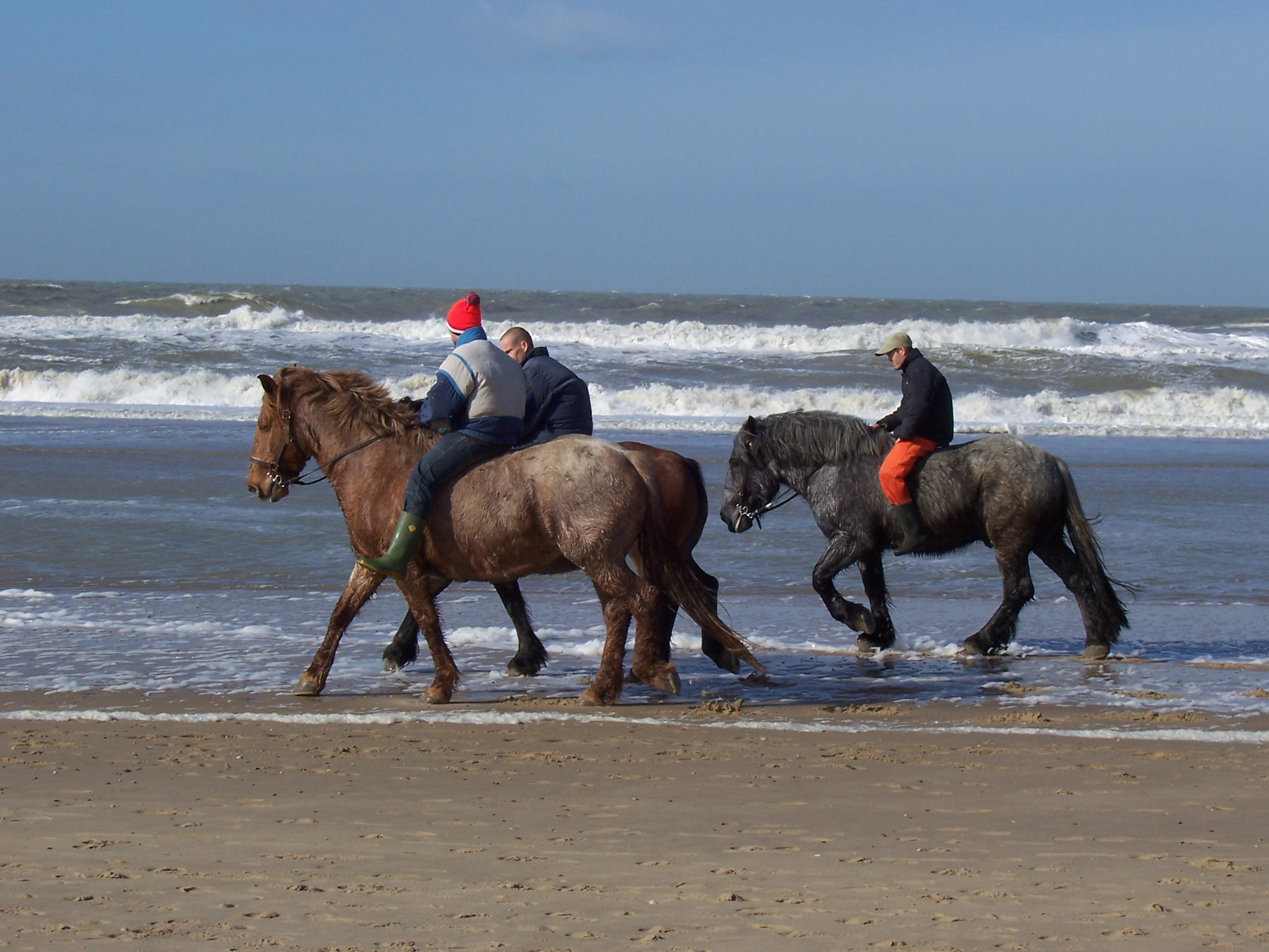 Informele Strao op Walcheren.